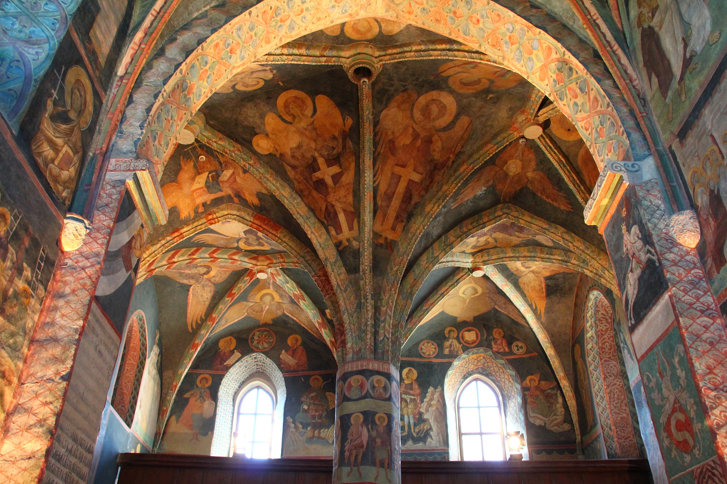 Lublin, kaplica p.w. Św. Trójcy, poł. XIV, XV, XVII